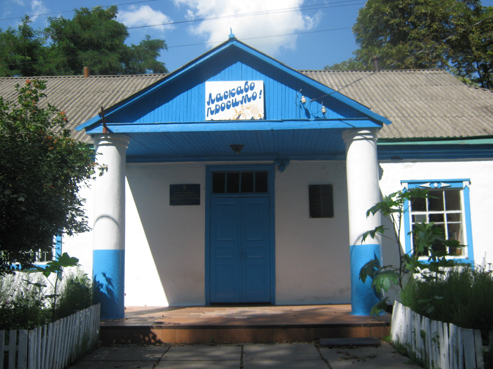 Безуглівка (Згурівський район)